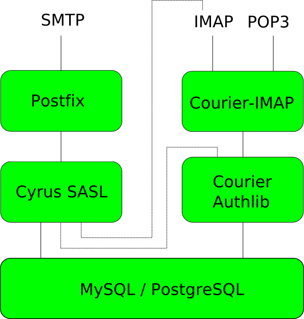 Typische Mailserver-Konfiguration